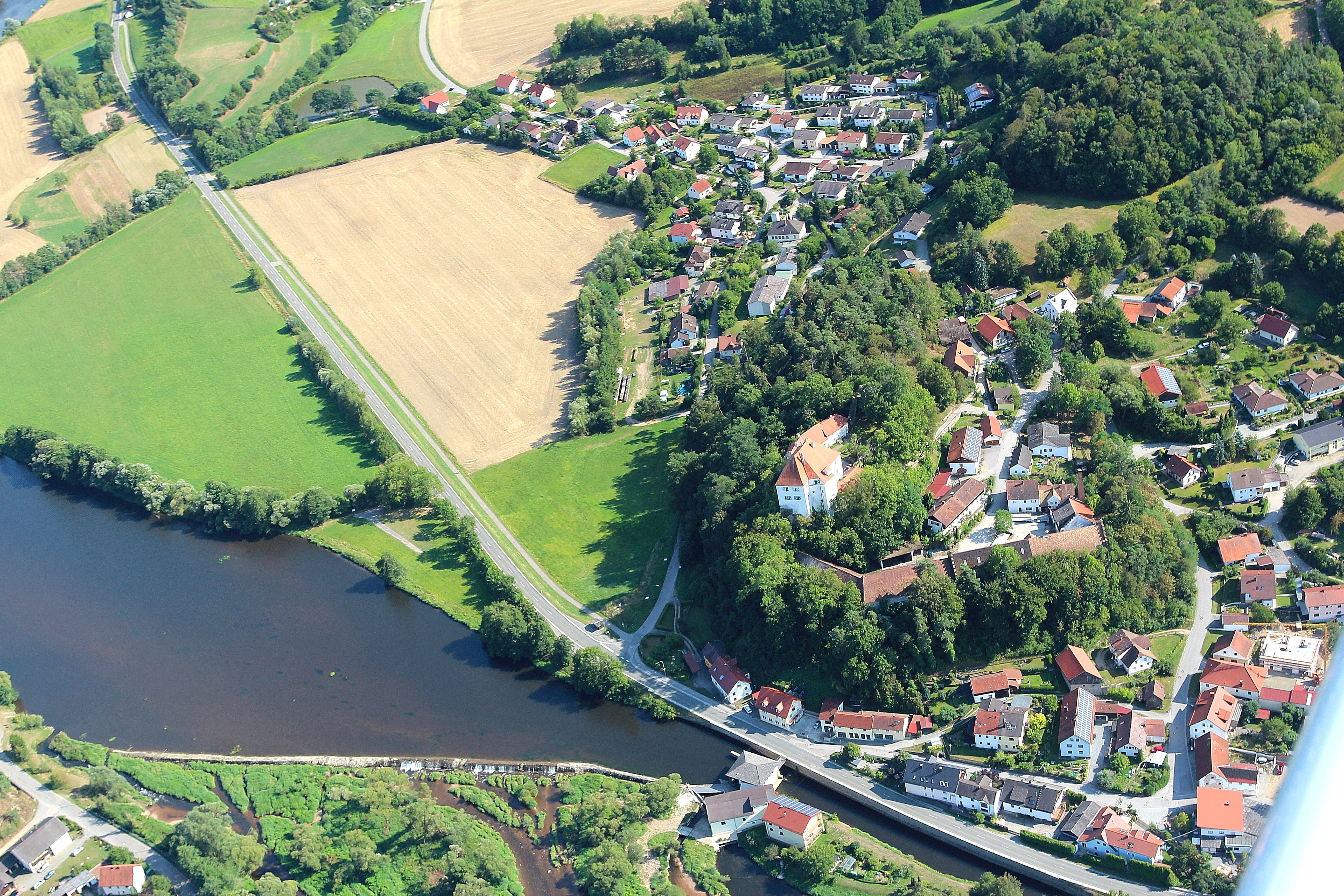 Stefling mit Schloss Stefling am Fluss Regen